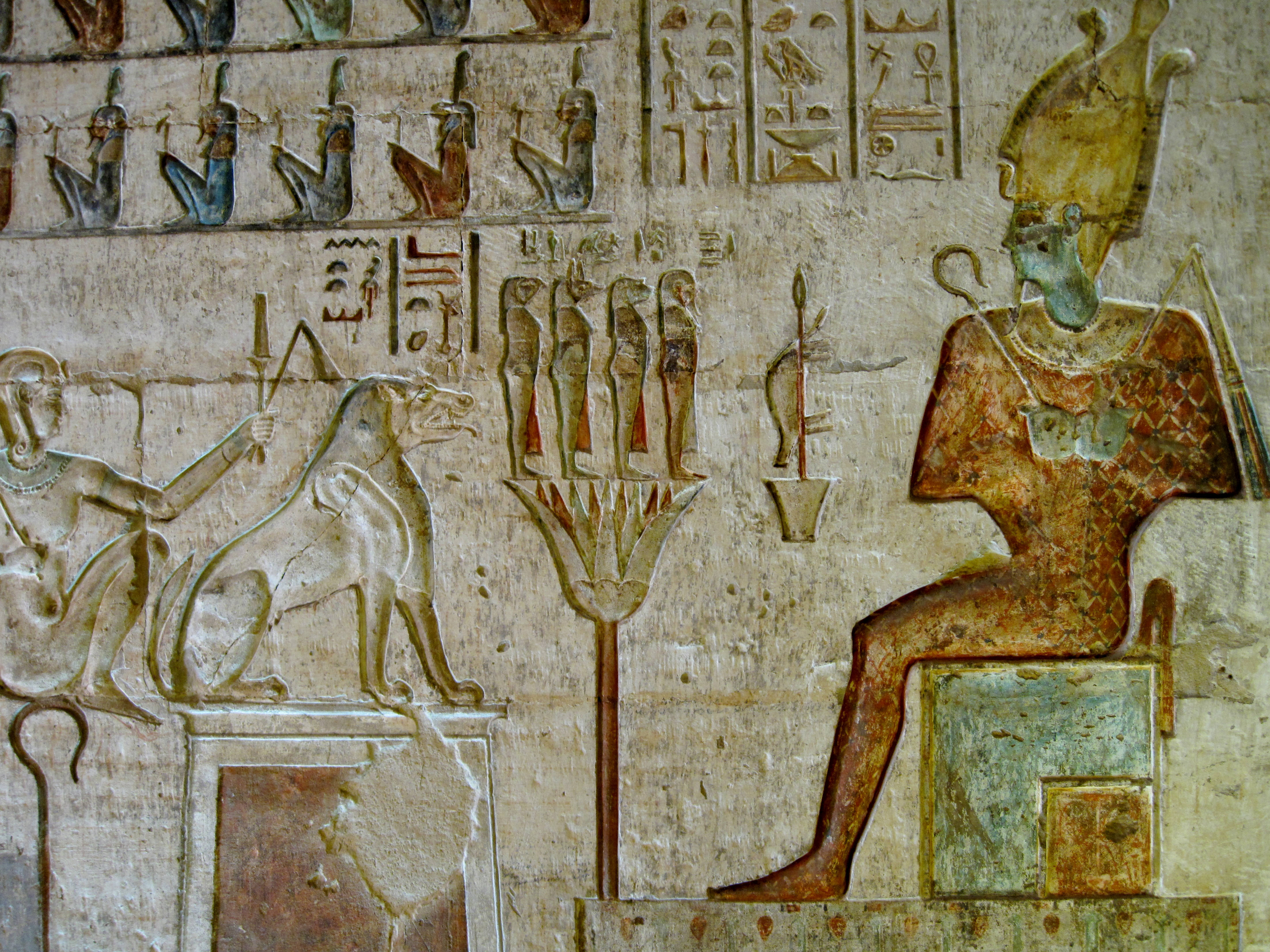 Relief im Innenraum des Hathor-Tempels von Deir el-Medina („Kloster der Stadt“), altägyptisch Set Maat („Platz der Wahrheit“), in Theben-West bei Luxor, Ägypten